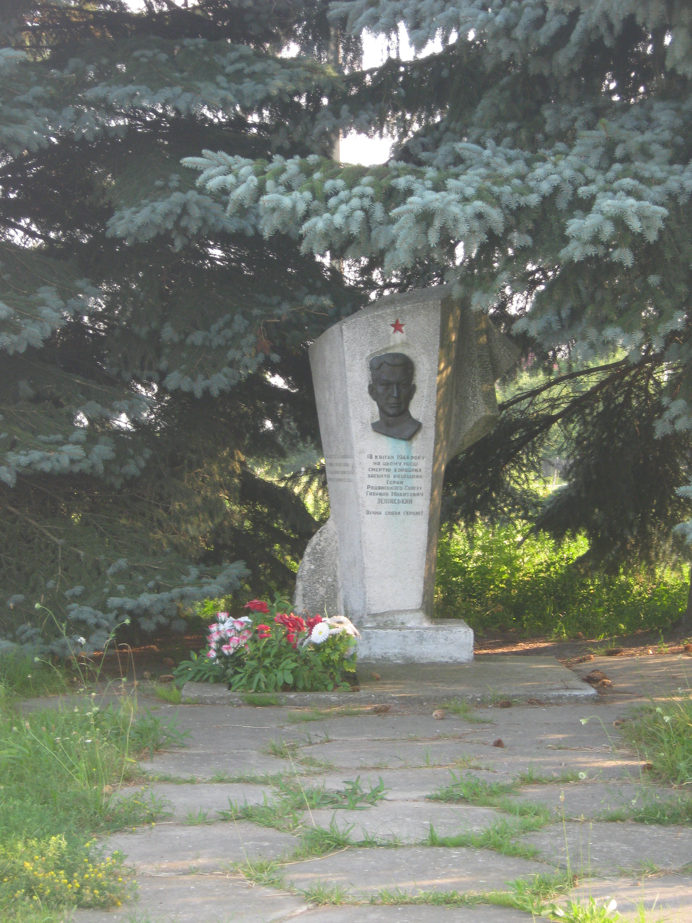 Пам’ятний знак з погруддям Героя Радянського Союзу, розвідника Зеленського Гавриїла Микитовича, який загинув в околицях села.